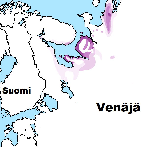 Pomori